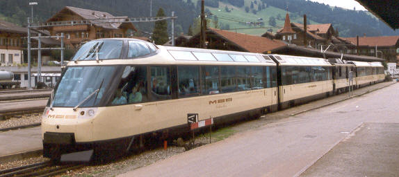 Crystal Panoramic Express in Zweisimmen